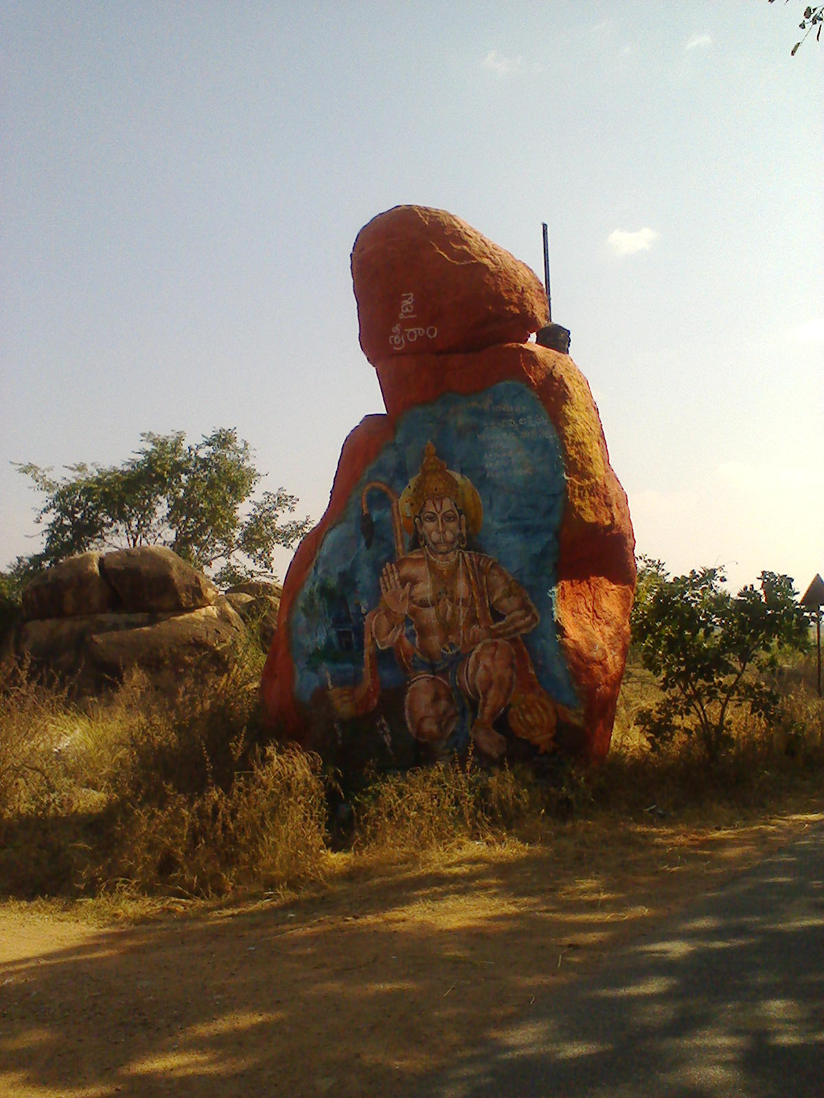 పిల్లిగుండ్ల ఆంజనేయస్వామి, మేళ్ళచెర్వు